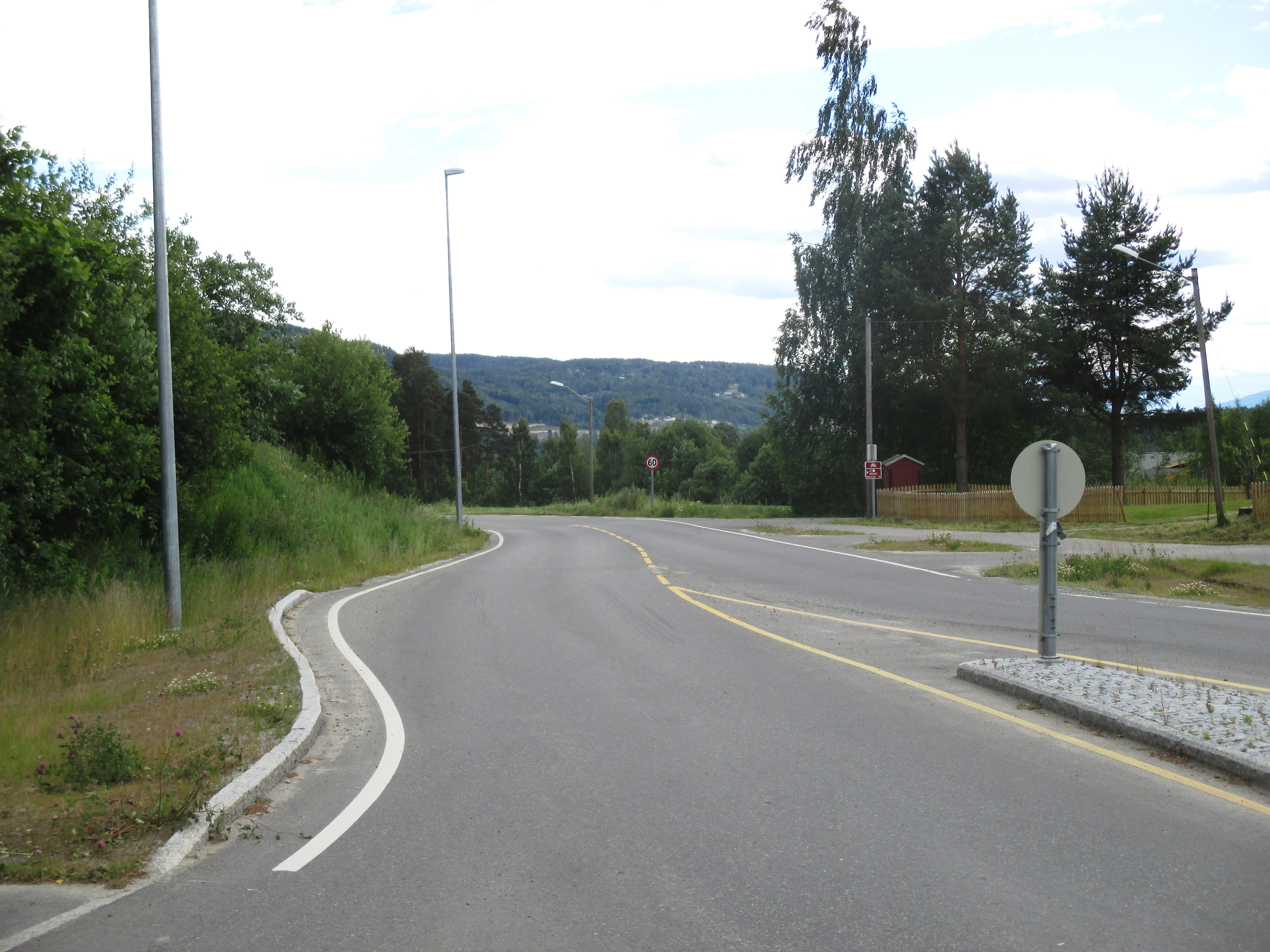 Fylkesvei 1600 (tidl. 229) utenfor Tangen